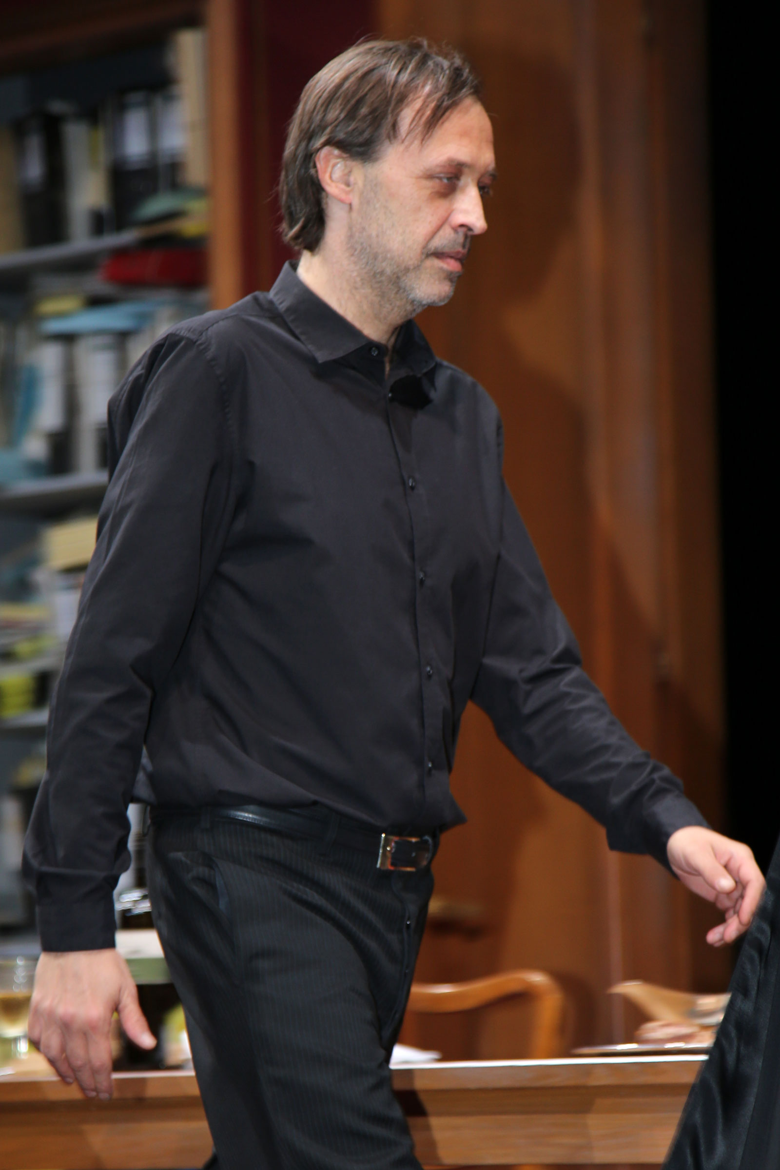 Hojsa_Tommy-9341